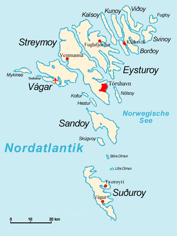 Karte der Färöer mit den Namen aller Inseln und der Städte.